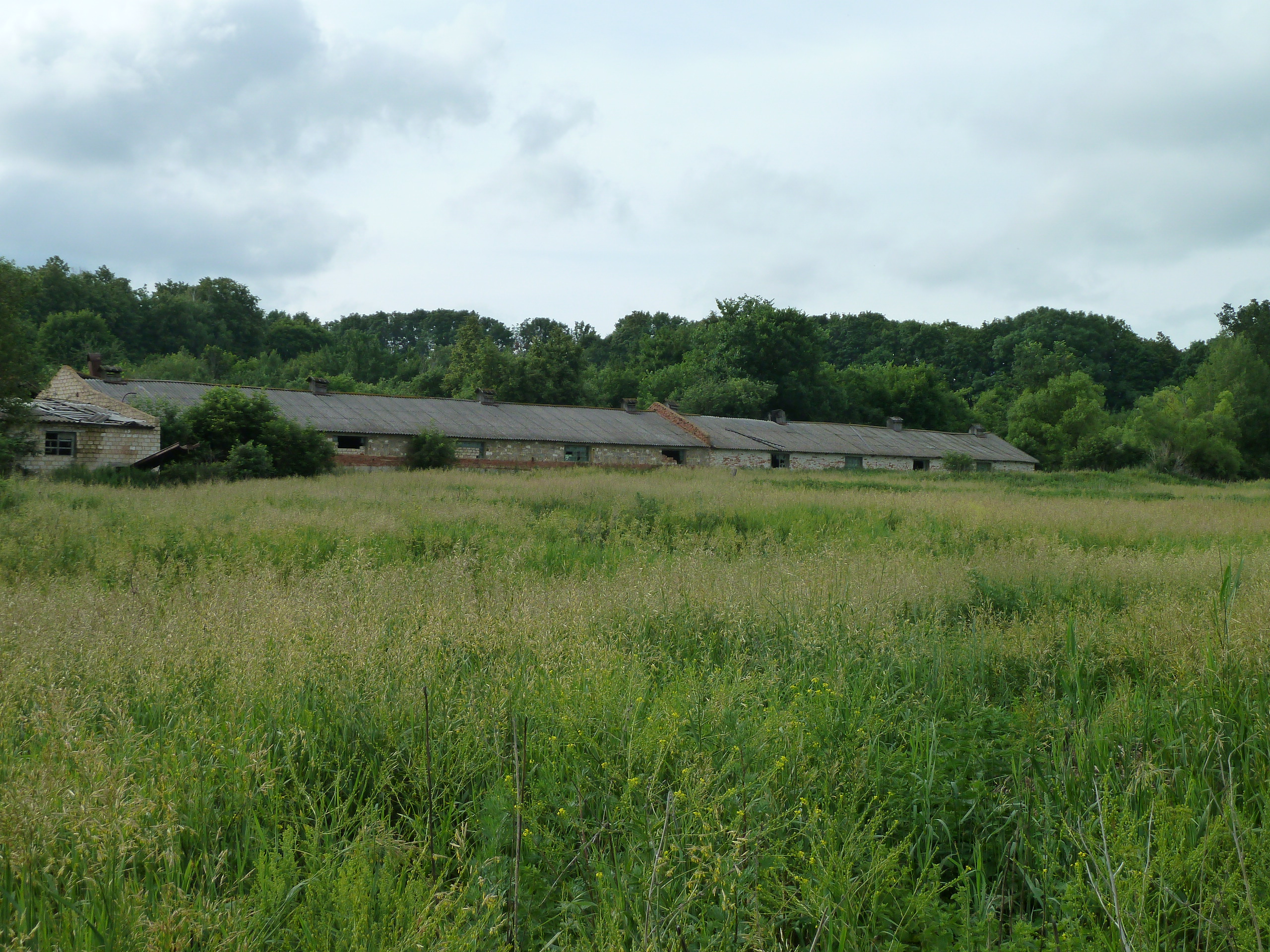 "Дикое поле" на месте птичника, крупорушки и лесопилорамы